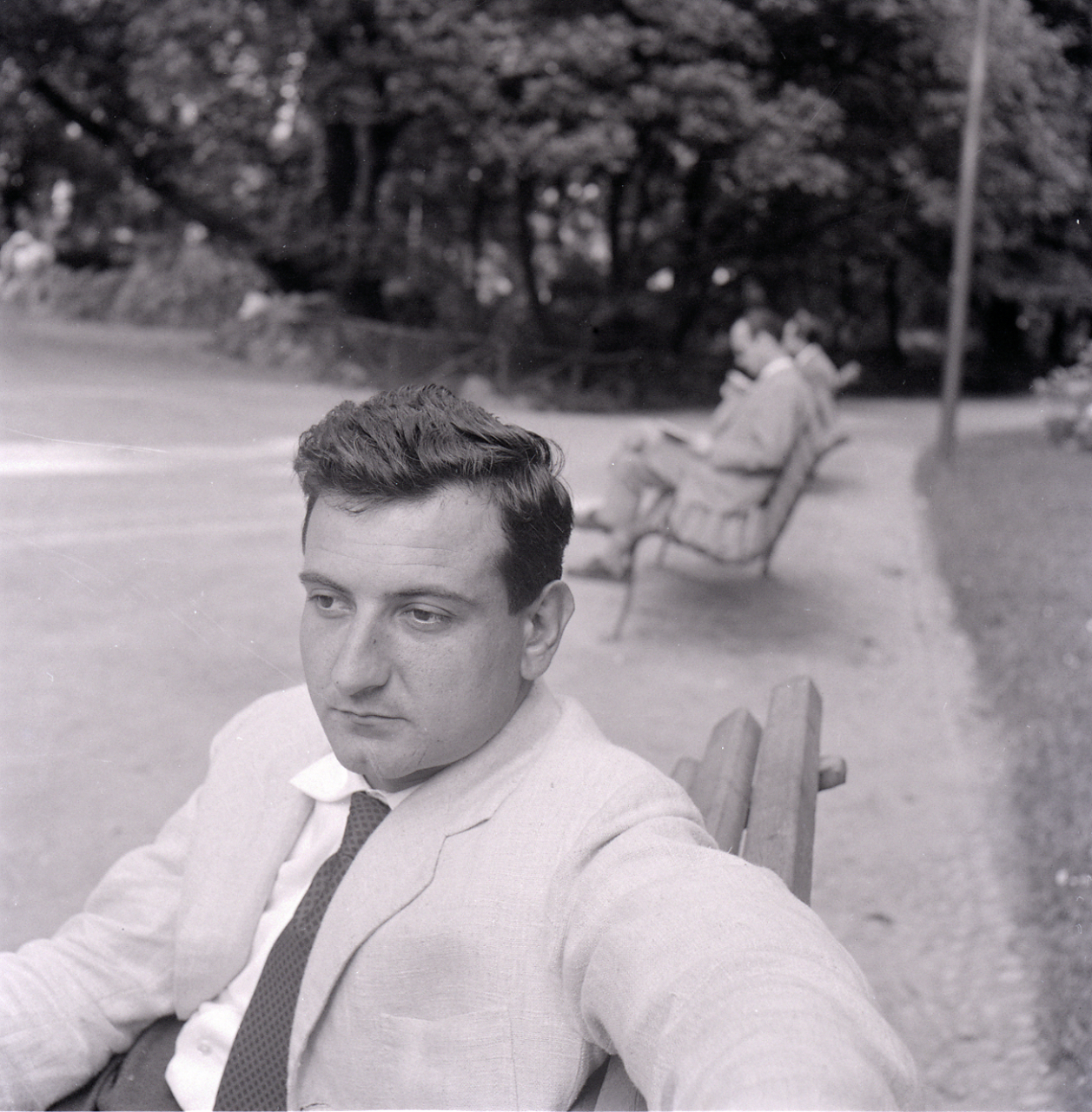 Servizio fotografico : Italia, 1982 / Paolo Monti. - Buste: 6, Fototipi: 9 : Negativo b/n, gelatina bromuro d'argento/ pellicola ; 6x6. - ((Serie costituita da 6 buste di carta, tenute insieme da graffetta, identificate con i nn.: R4447, R4448, R4449, R4450, R4451, R4452/4455. - Sulla busta 4447: "Parise"